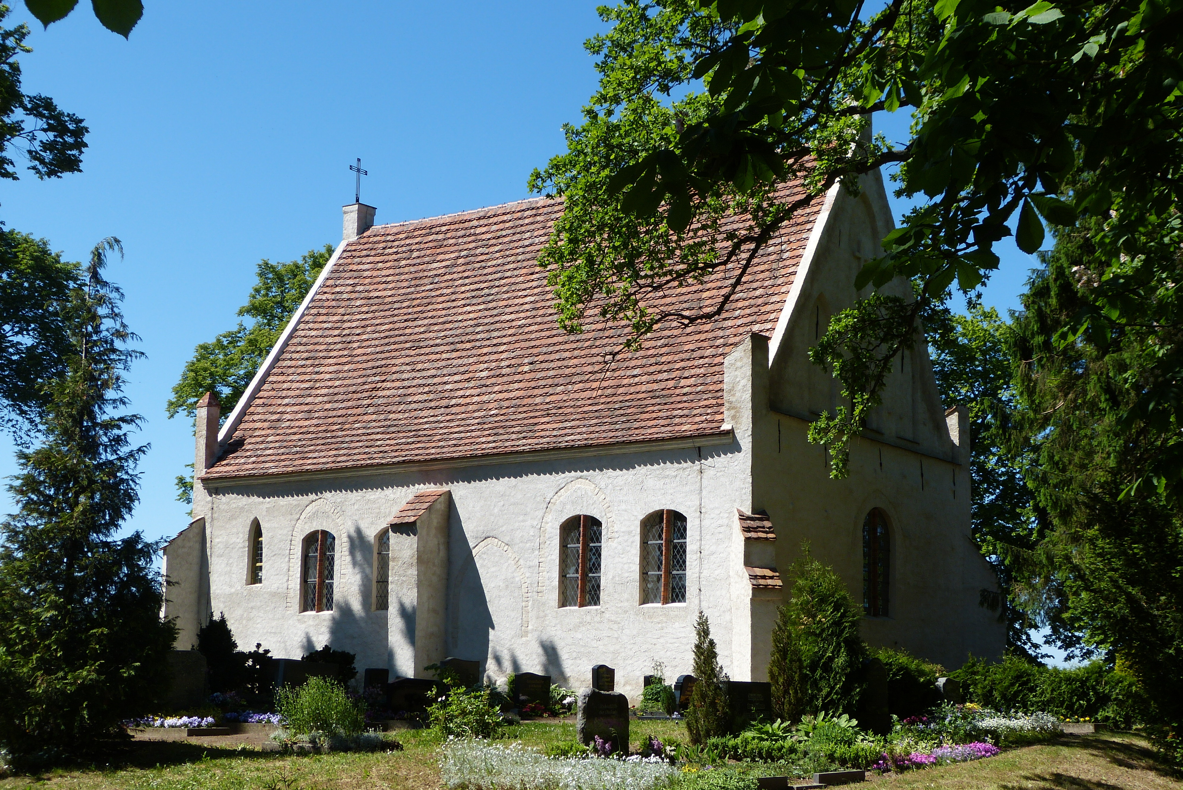 Kirche in Pinnow (Gemeinde Murchin), Südseite